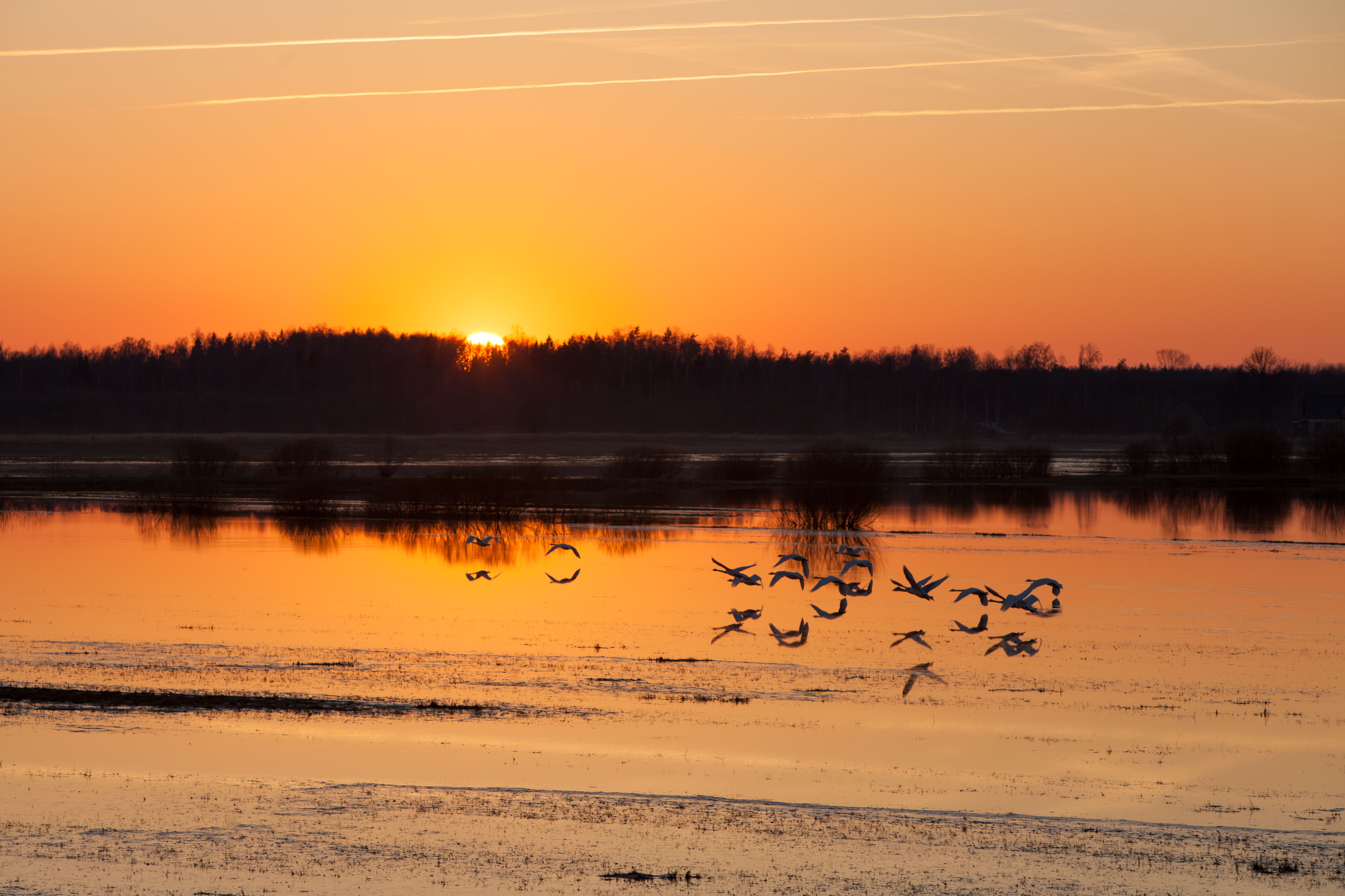 Svētes palienes dabas parks